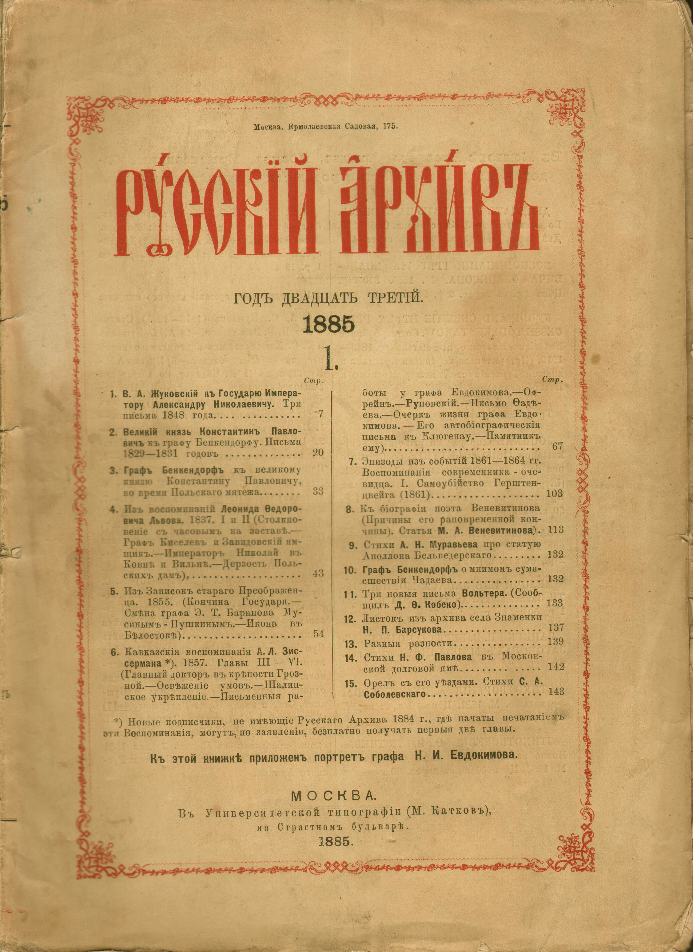 Обложка журнала "Русский архив"